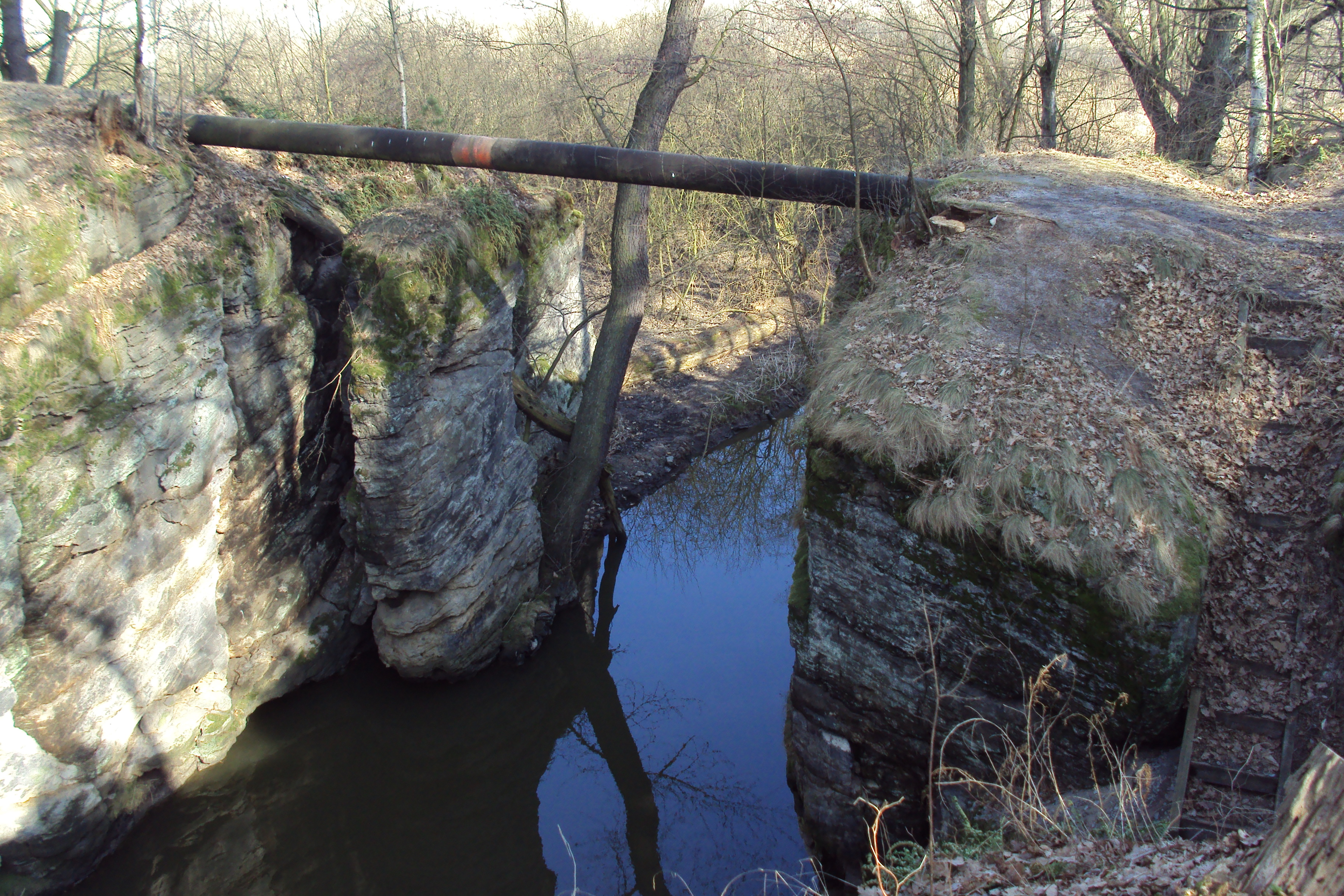 Umělý kanál, napájení Novozámeckého rybníka z Bobřího potoka, katastr Zahrádky u České Lípy